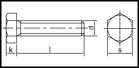 Sætskrue ISO 4017